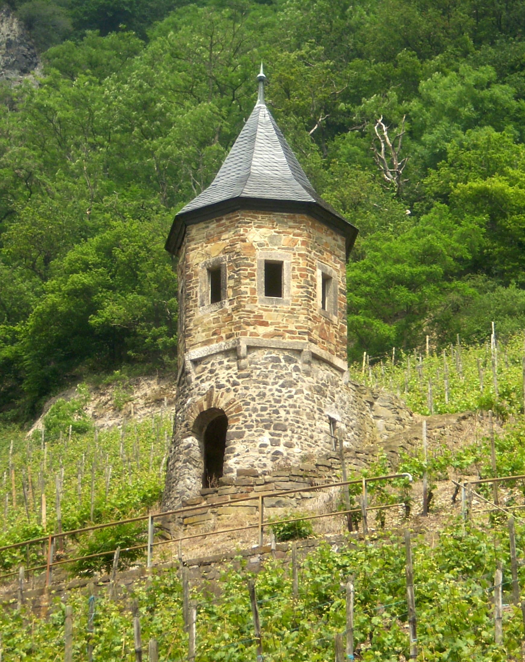 Duffes, Wachhäuschen in den Weinbergen von Rhöndorf am Drachenfels, Bad Honnef